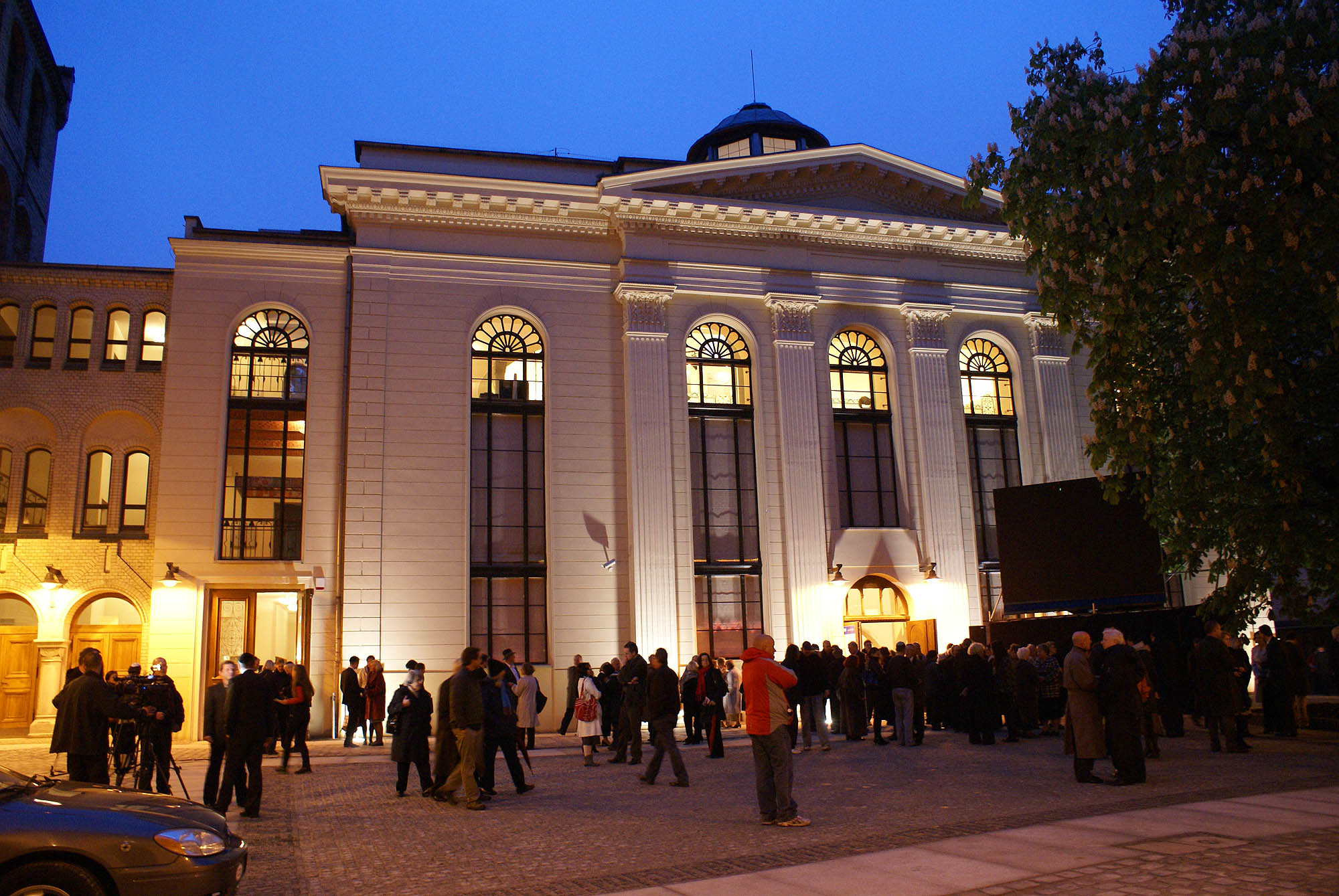 Wrocław, synagoga, 1820-1829